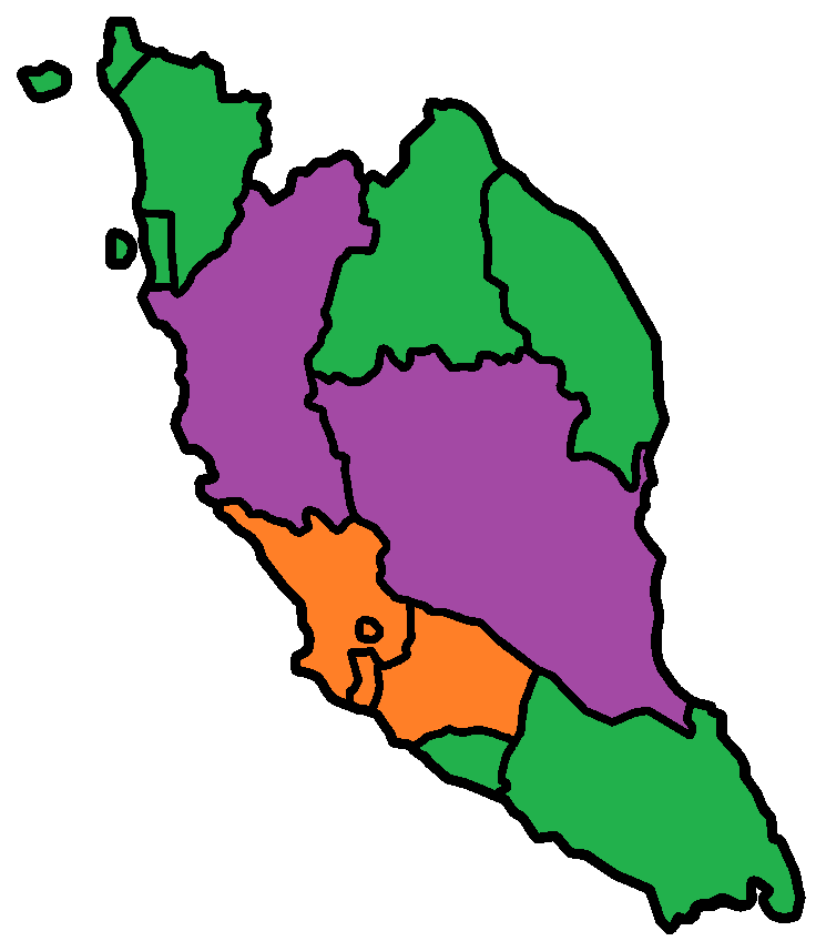 马来西亚华语受各方言的影响之示意图